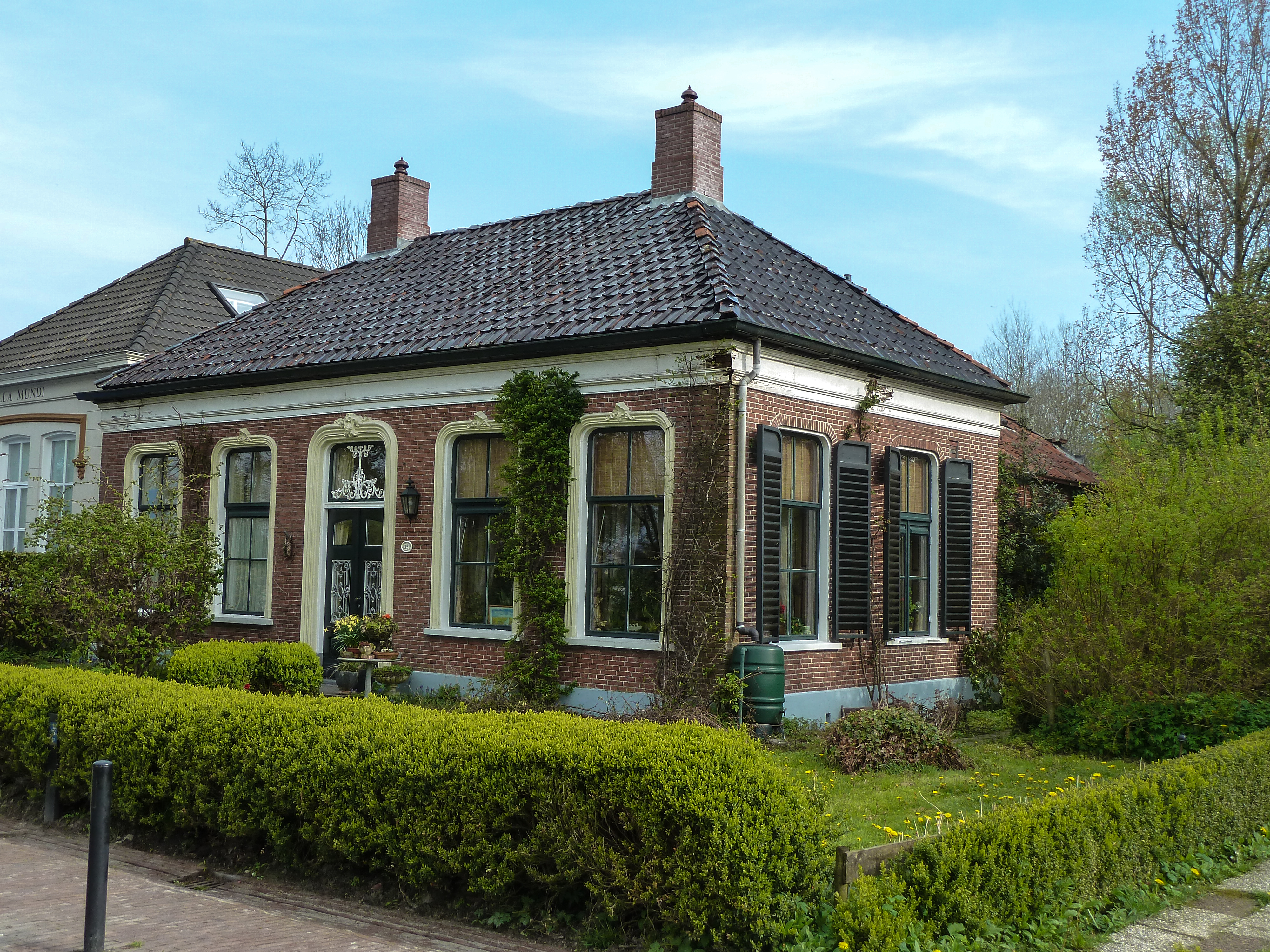 Voormalige schoolmeesterswoning in Onderdendam. Op de achtergrond de vroegere lagere school van Menkeweer.